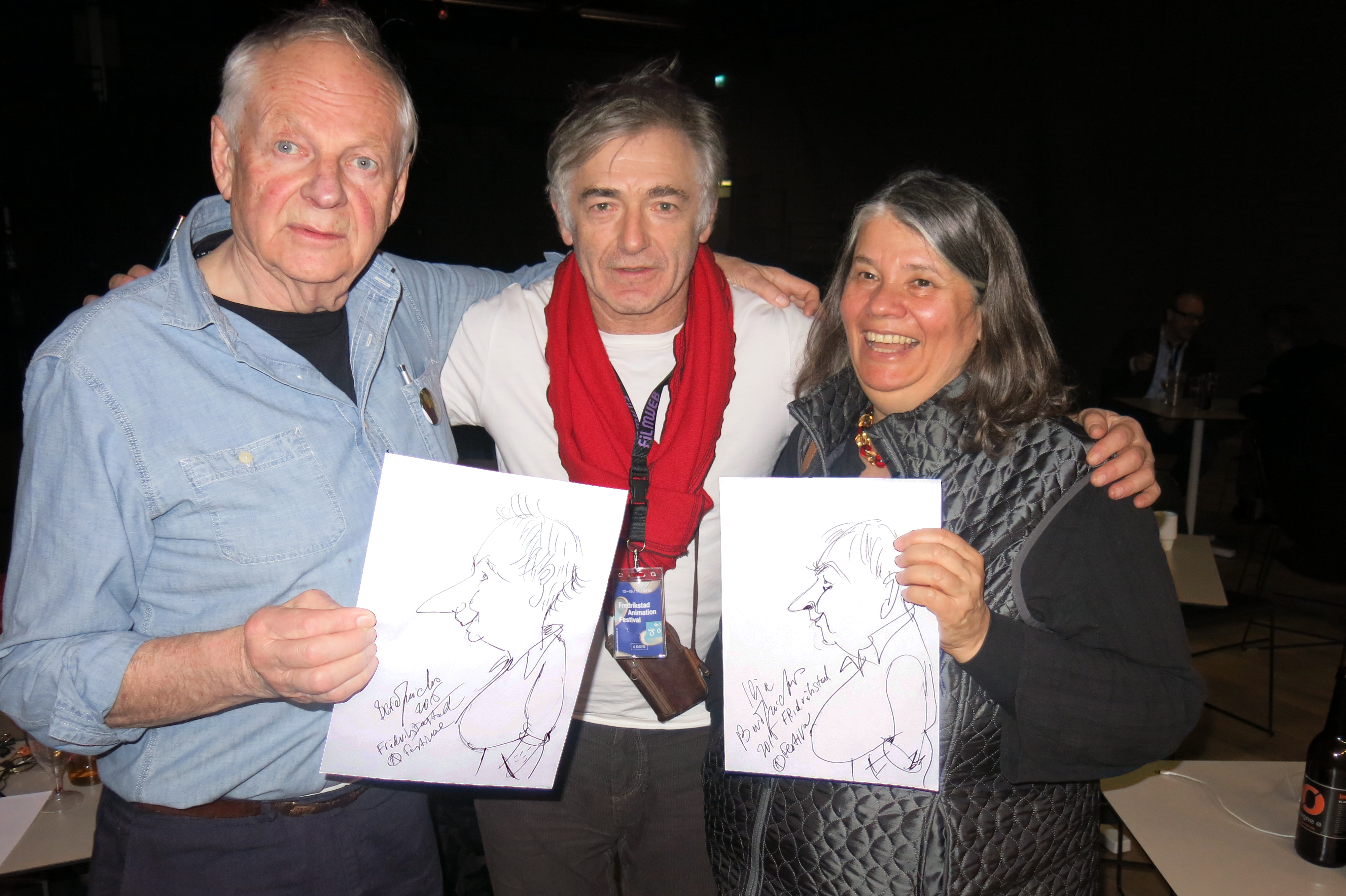 Илья Березницкас и Ричард Уильямс, дружеский шарж, анимационный фестиваль в Фредрикстаде, Норвегия